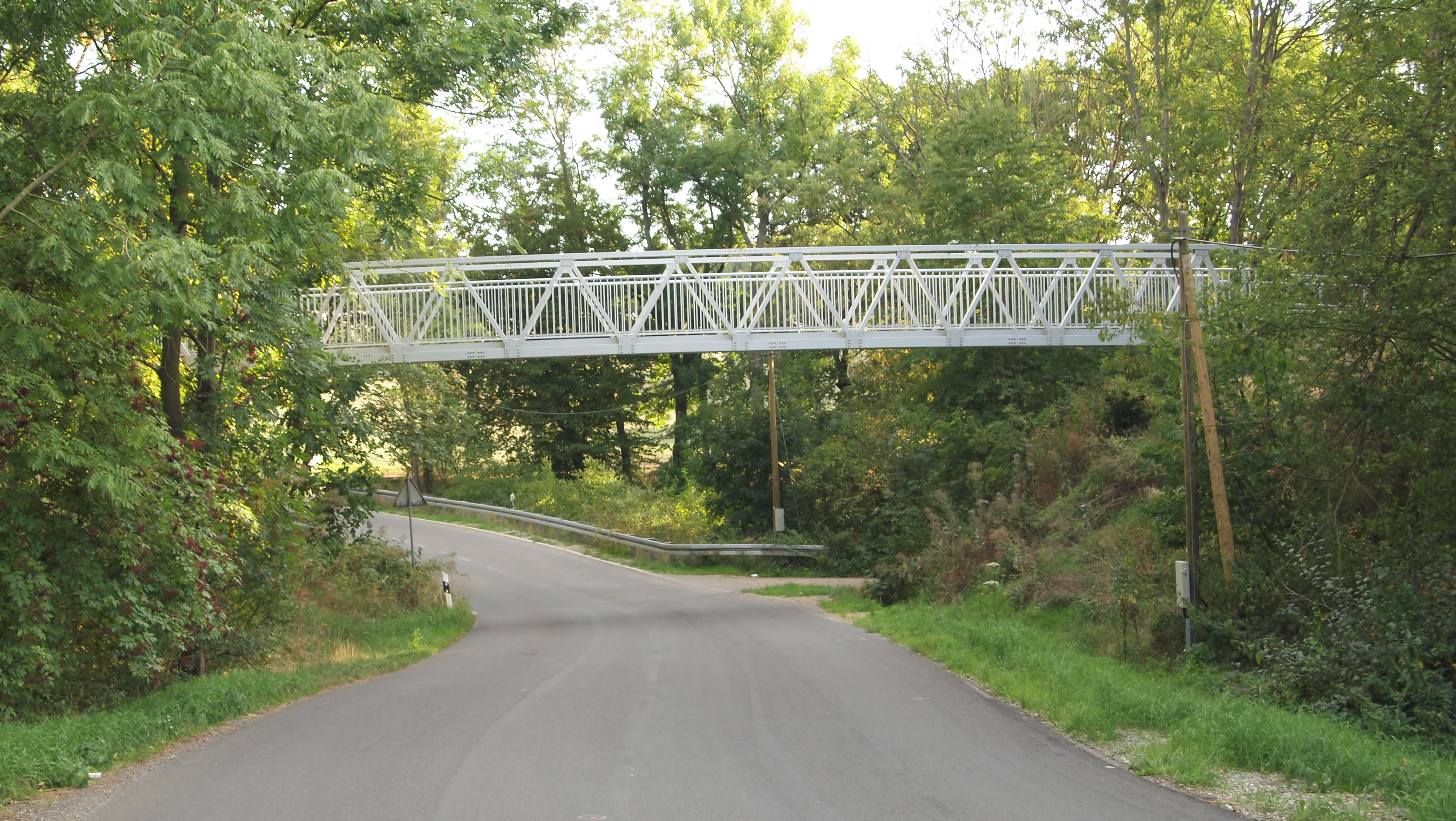 Nachbau der Brücke der Bahnstrecke Zeitz - Camburg über die Kreisstraße Crauschwitz - Sieglitz; Baujahr 2018, für Radfahrer und Fußgänger..